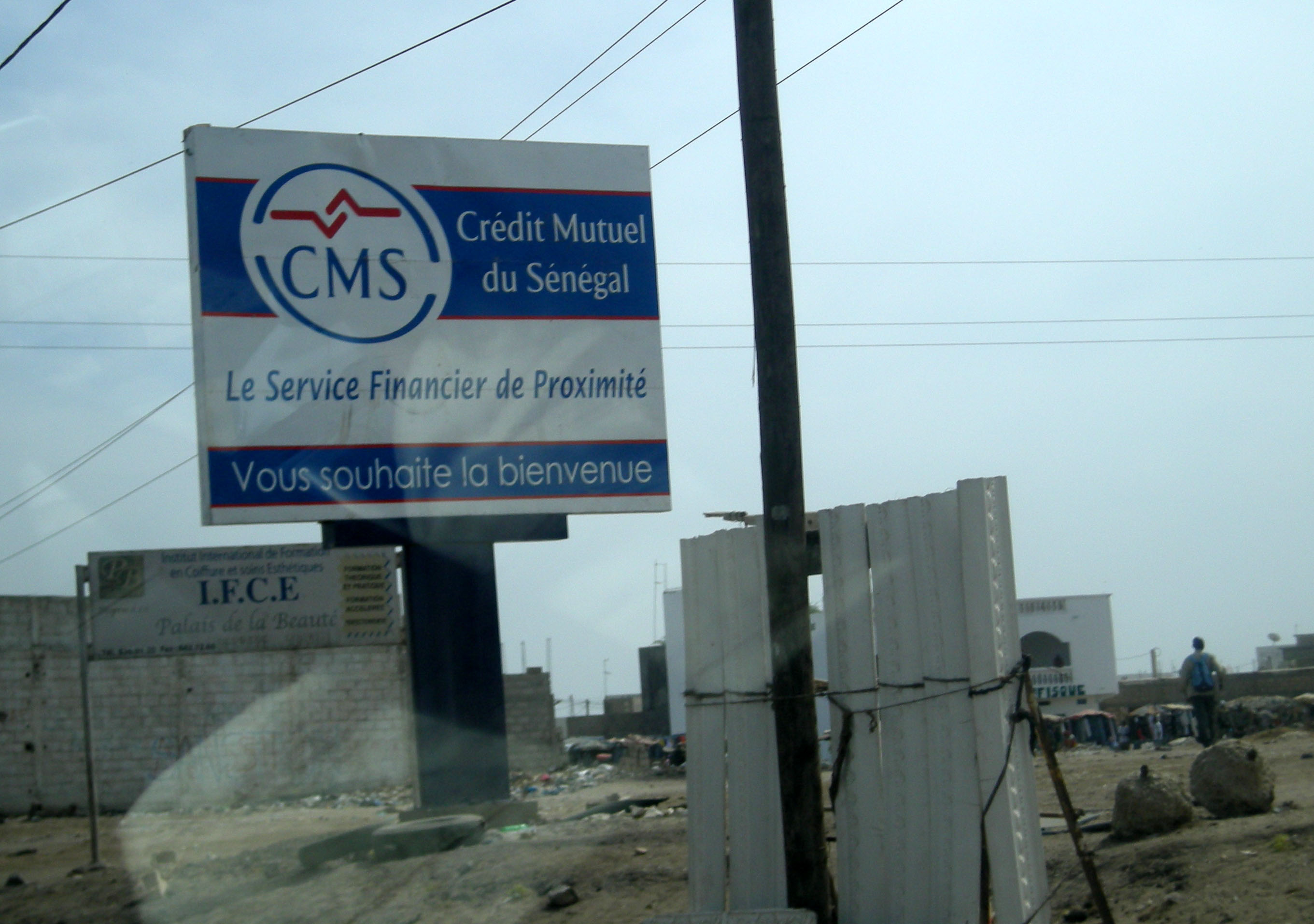 Panneau publicitaire pour le Crédit Mutuel du Sénégal à Rufisque